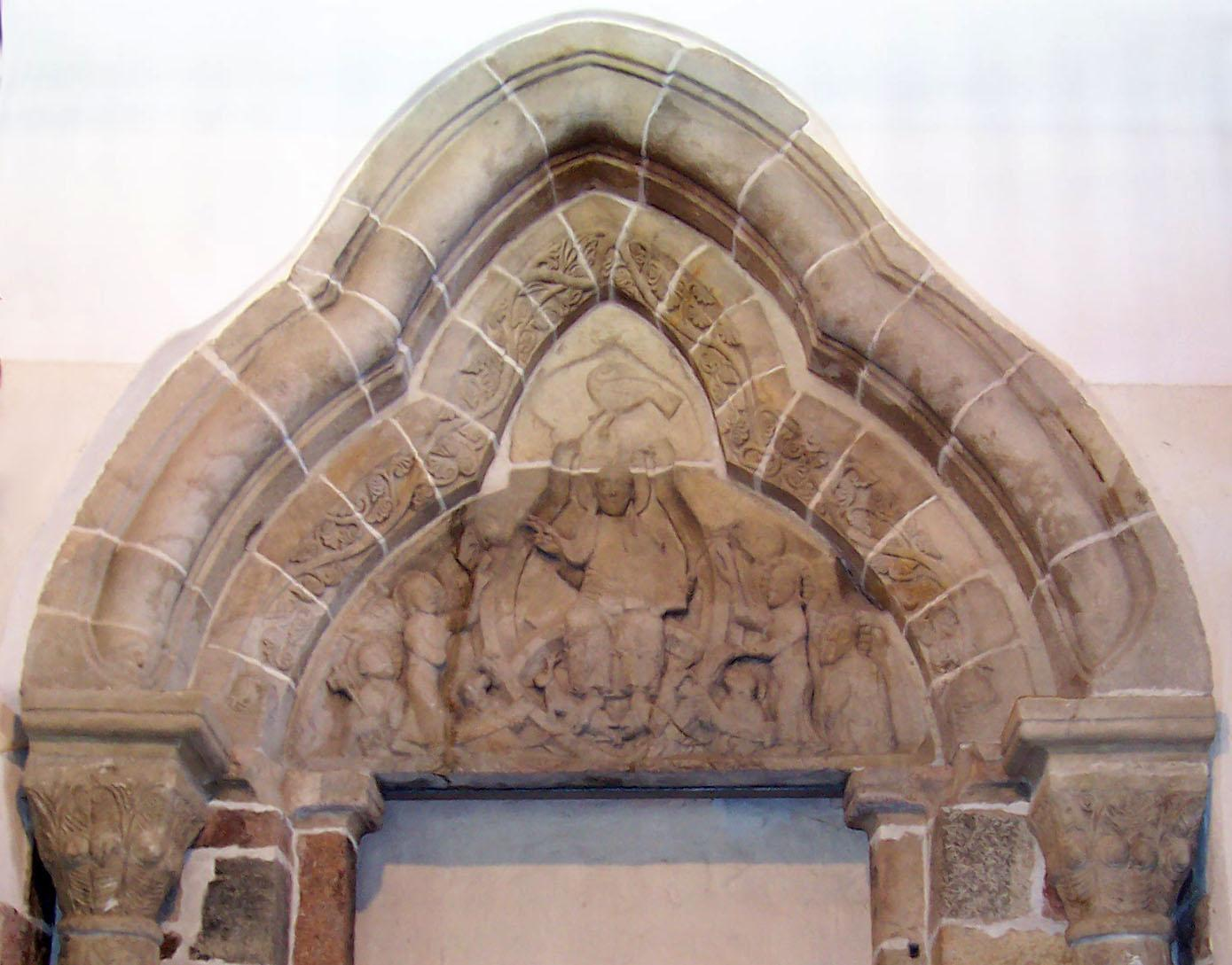 Romański portal (portal północny) w Bazylice Św. Trójcy w Strzelnie